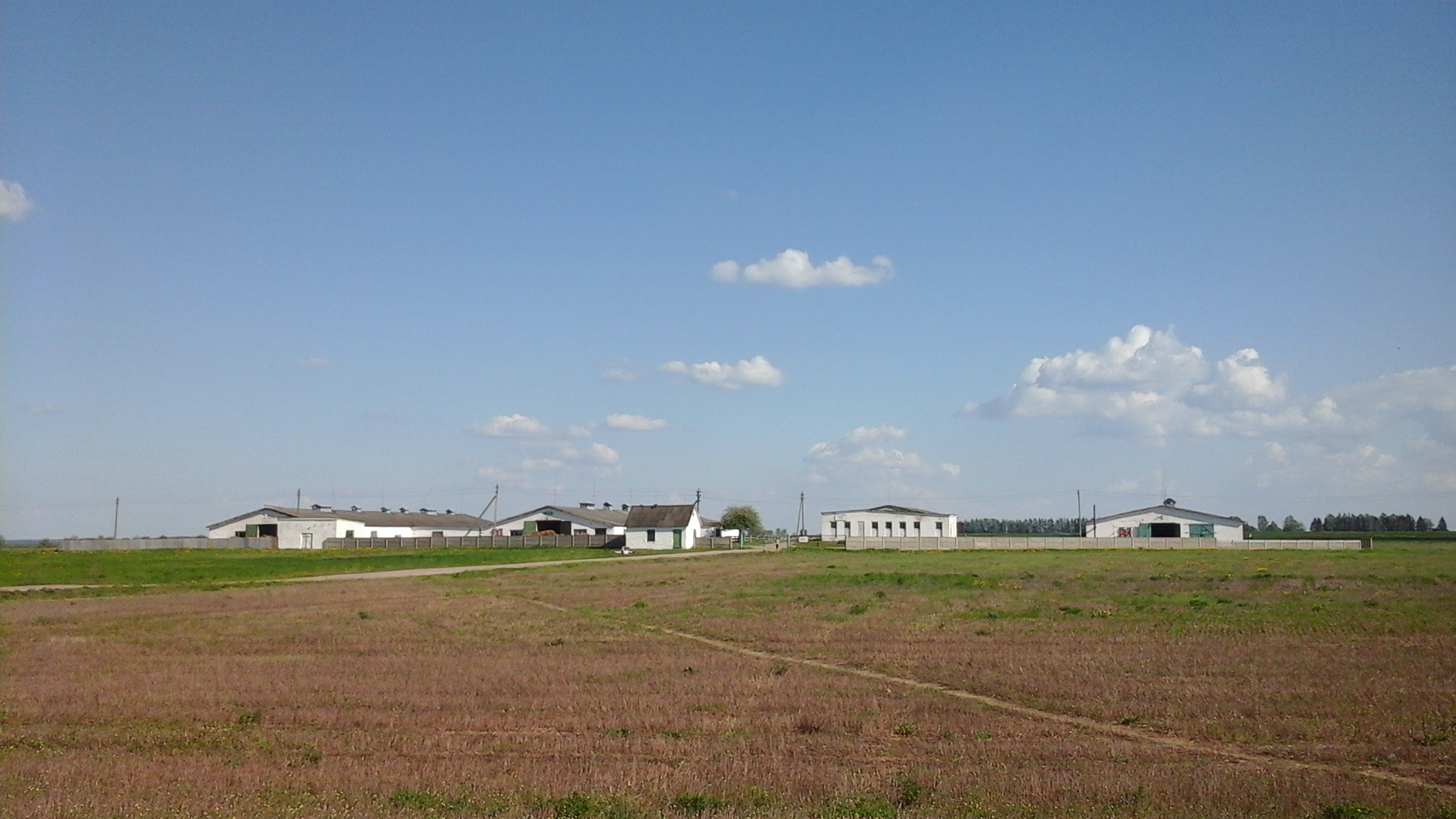 Ферма в деревне Гиричи